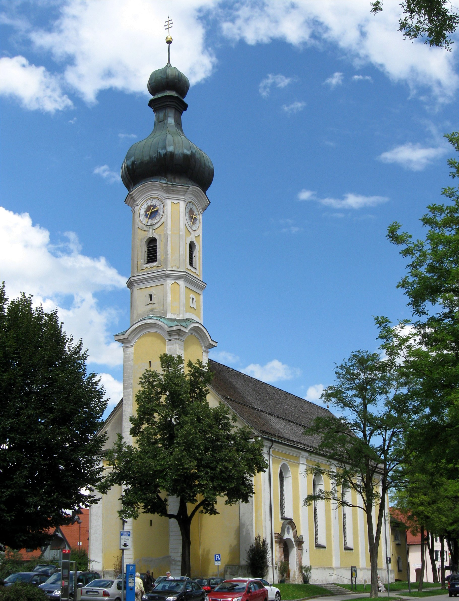 Mühlfeldkirche, Mariahilf, Bad Tölz, barocker Saalbau mit eingezogenem halbrundem Chor und Zwiebel-Westturm, von Lorenz Reiter nach Plänen von Joseph Schmuzer, 1735-37, Turmoberbauentwurf 1759 von Lorenz Sappl; mit Ausstattung.